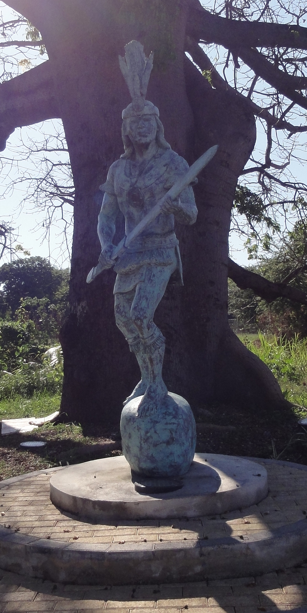 Estatua de Agüeybaná II, El Bravo, en el Parque Monumento a Agüeybaná II, El Bravo, en la interseccion del Ponce Bypass y la Ave. Hostos, barrio Playa, Ponce, Puerto Rico